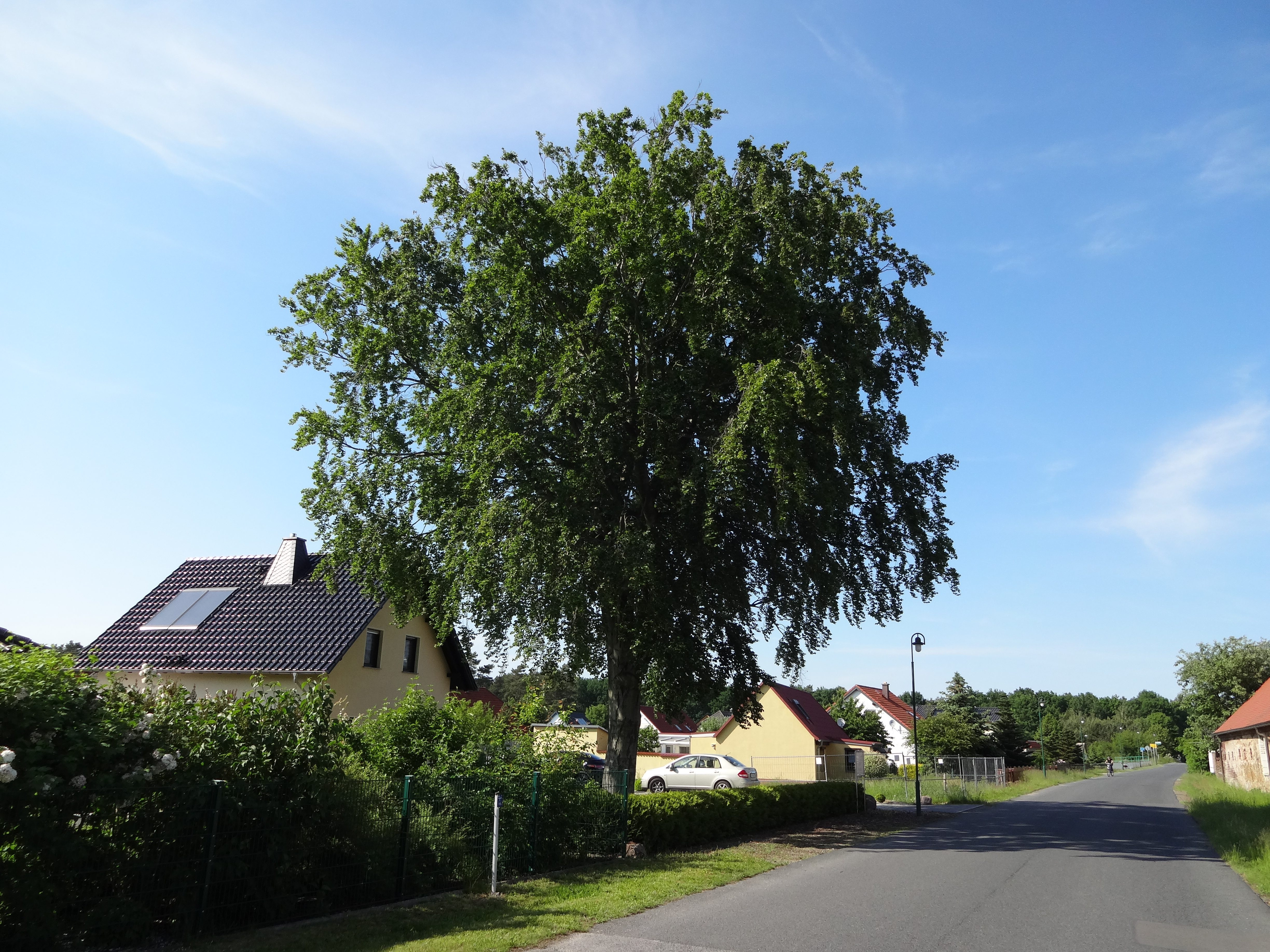 Naturdenkmal Nr. 0105-1 Hainbuche (Carpinus betulus) in Kleinkoschen auf Grundstück Dorfstraße Nr. 13